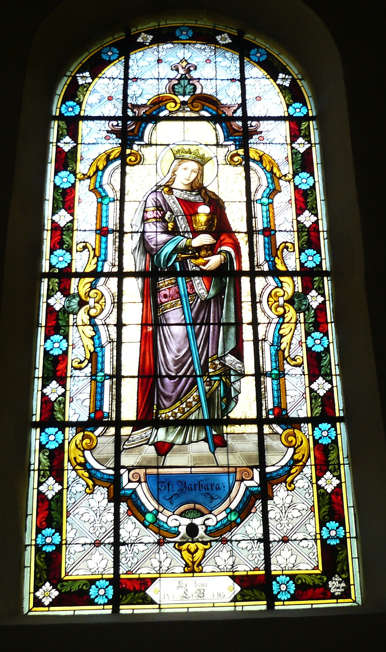 Vitrail représentant Sainte Barnabé situé dans l'église Sainte Rosalie de Rombach-le-Franc financé en 1895 par la famille Bournique